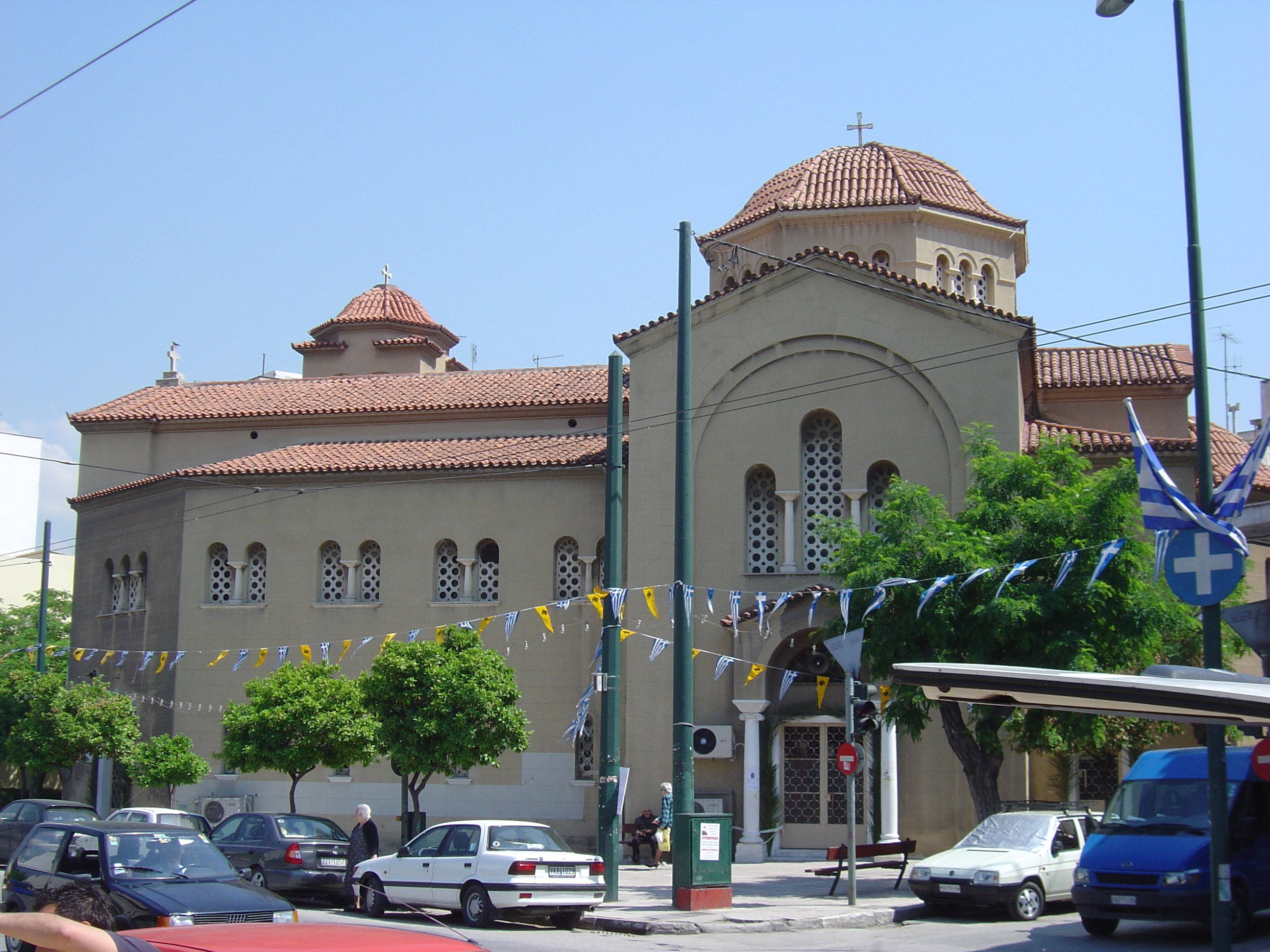 Η Εκκλησία του Αγίου Κωνσταντίνου στον Κολωνό, Οδός Λένορμαν